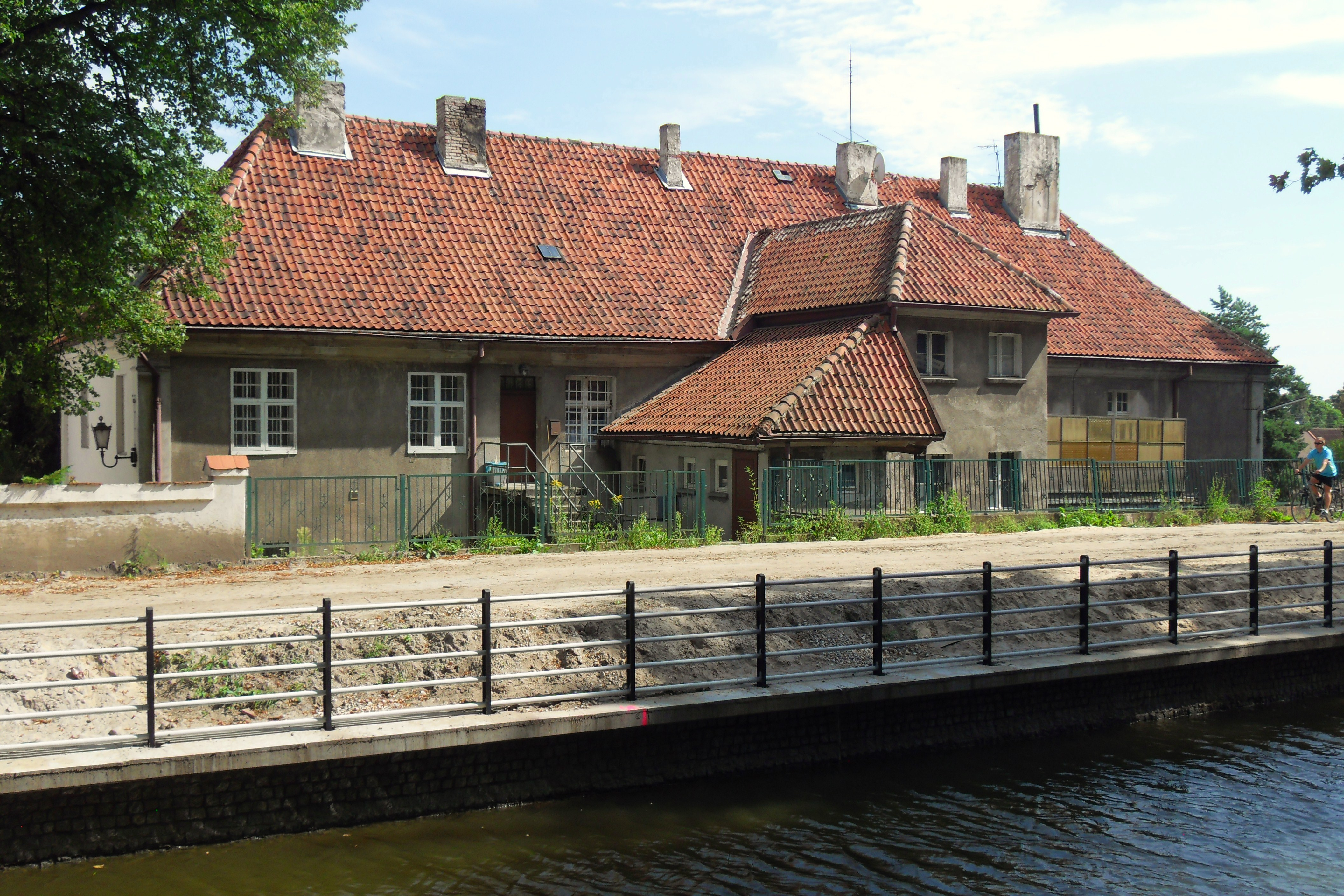 Gdańsk Święty Wojciech, Trakt św. Wojciecha 440 - plebania parafii św. Wojciecha, kon. XVIII, XIX. (tył) i Kanał Raduni